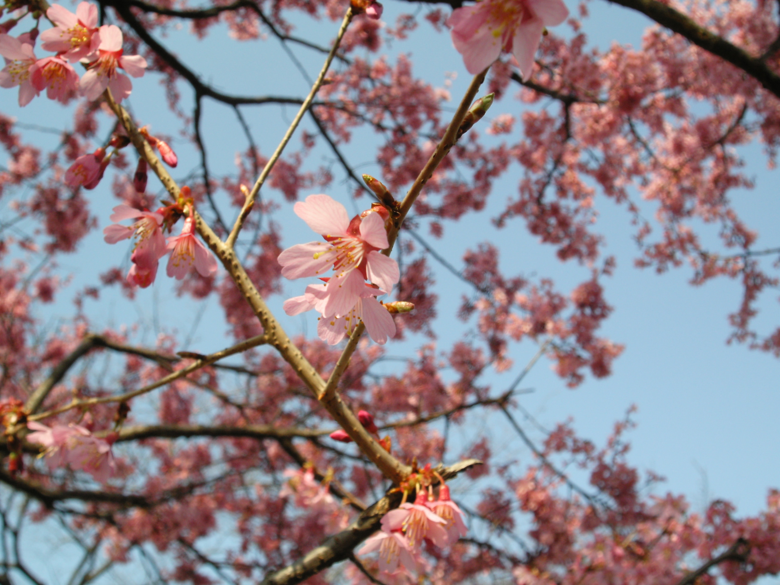 オカメザクラ Okamzakra